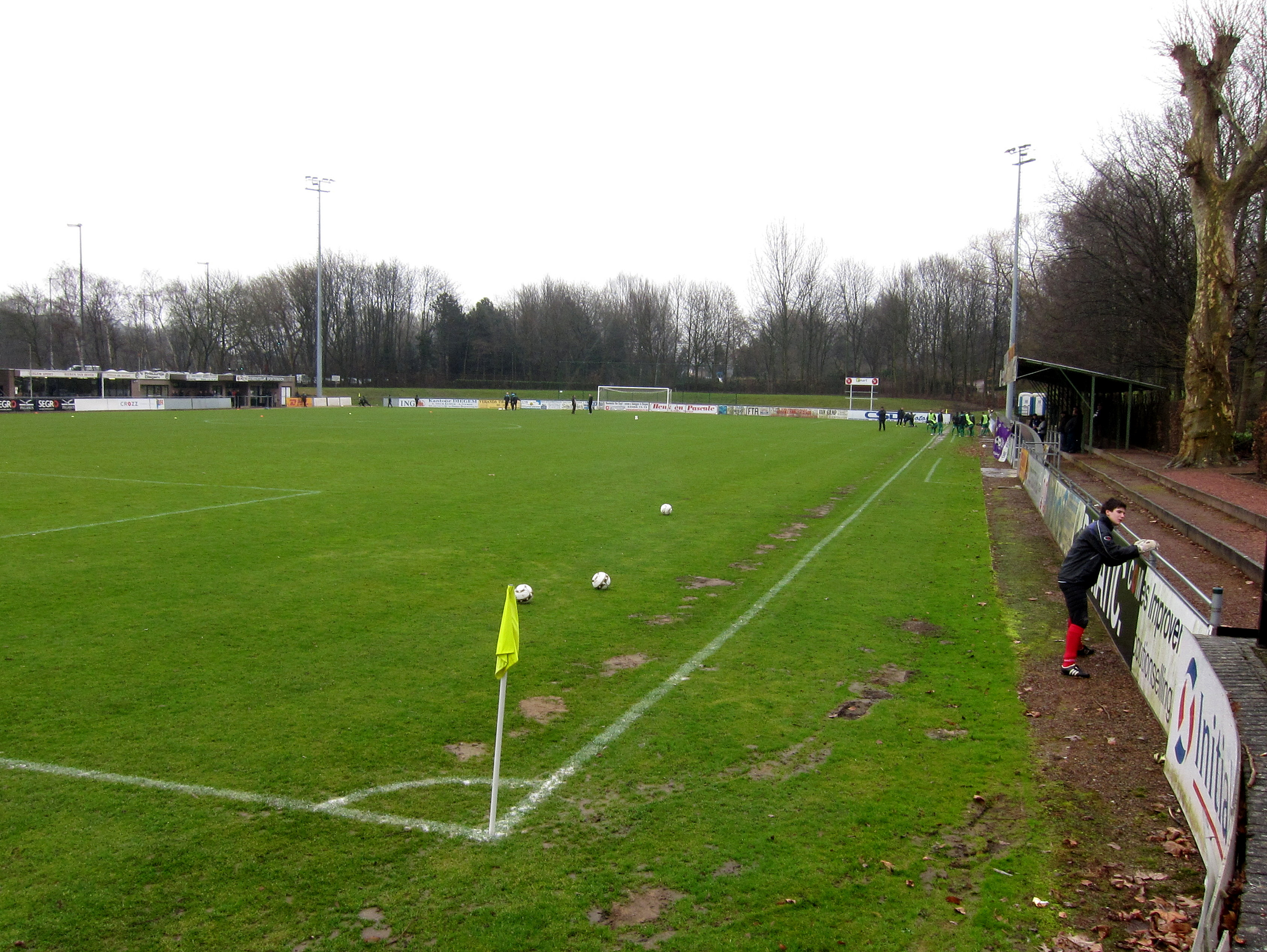 Het voetbalstadion van Diegem Sport te Diegem, België